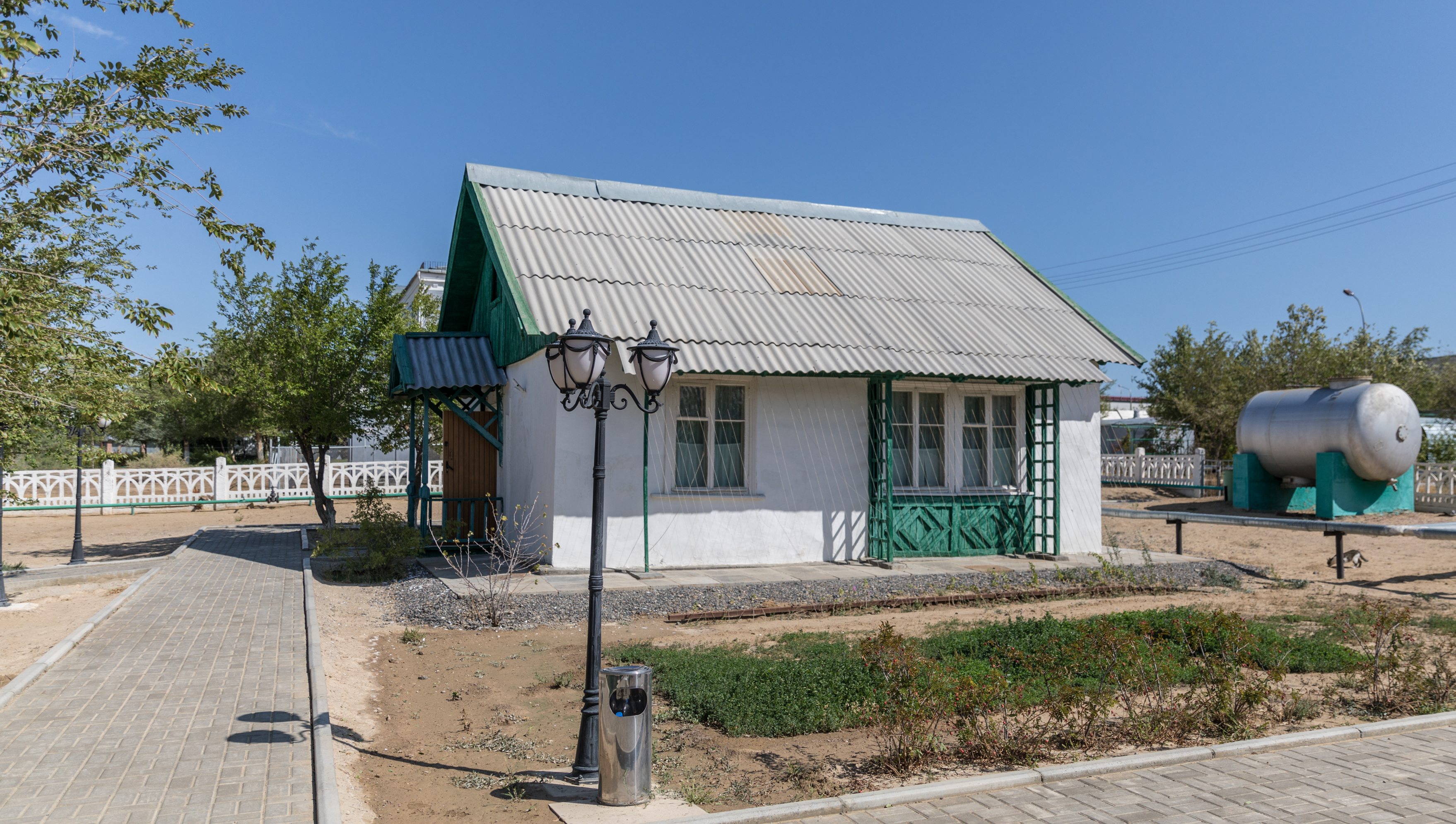 Baikonur Cosmodrome Korolev's house